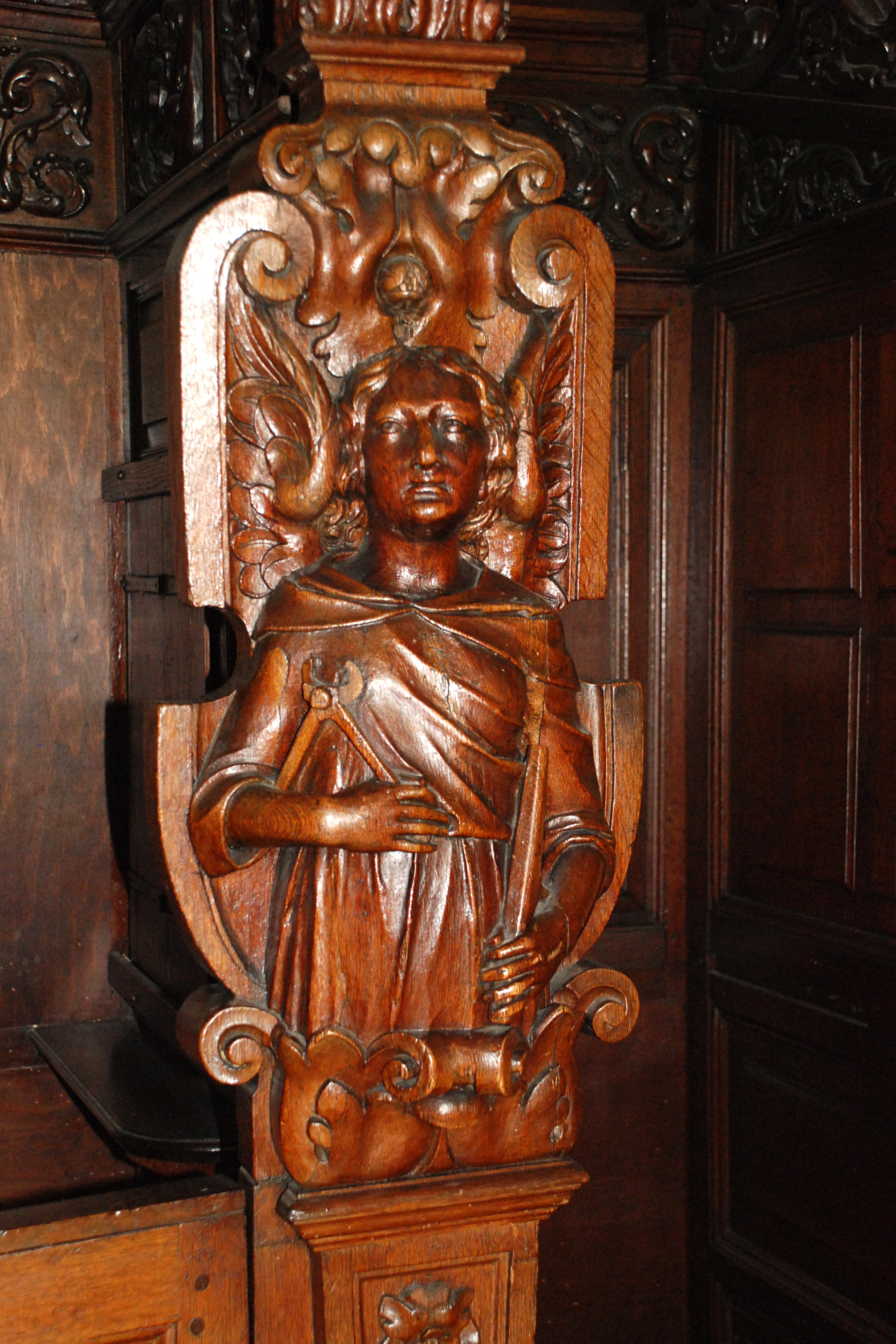 Belgique - Brabant wallon - Mont-Saint-Guibert - Église Saint-Guibert - Confessionnaux